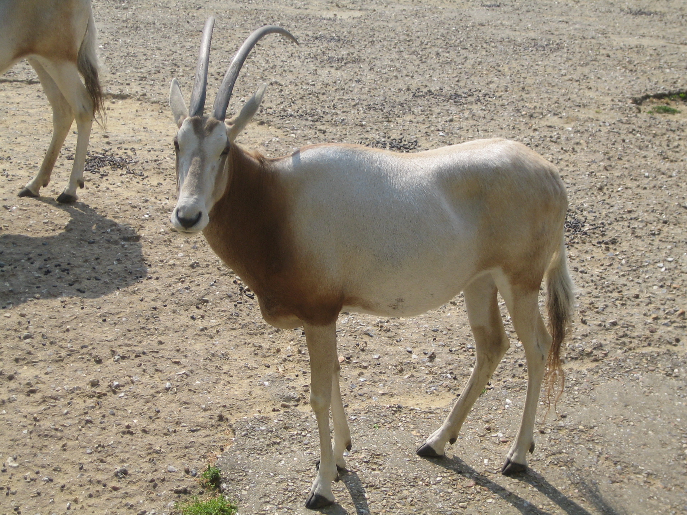 Oryx algazelle (oryx dammah), zoo de Vincennes.